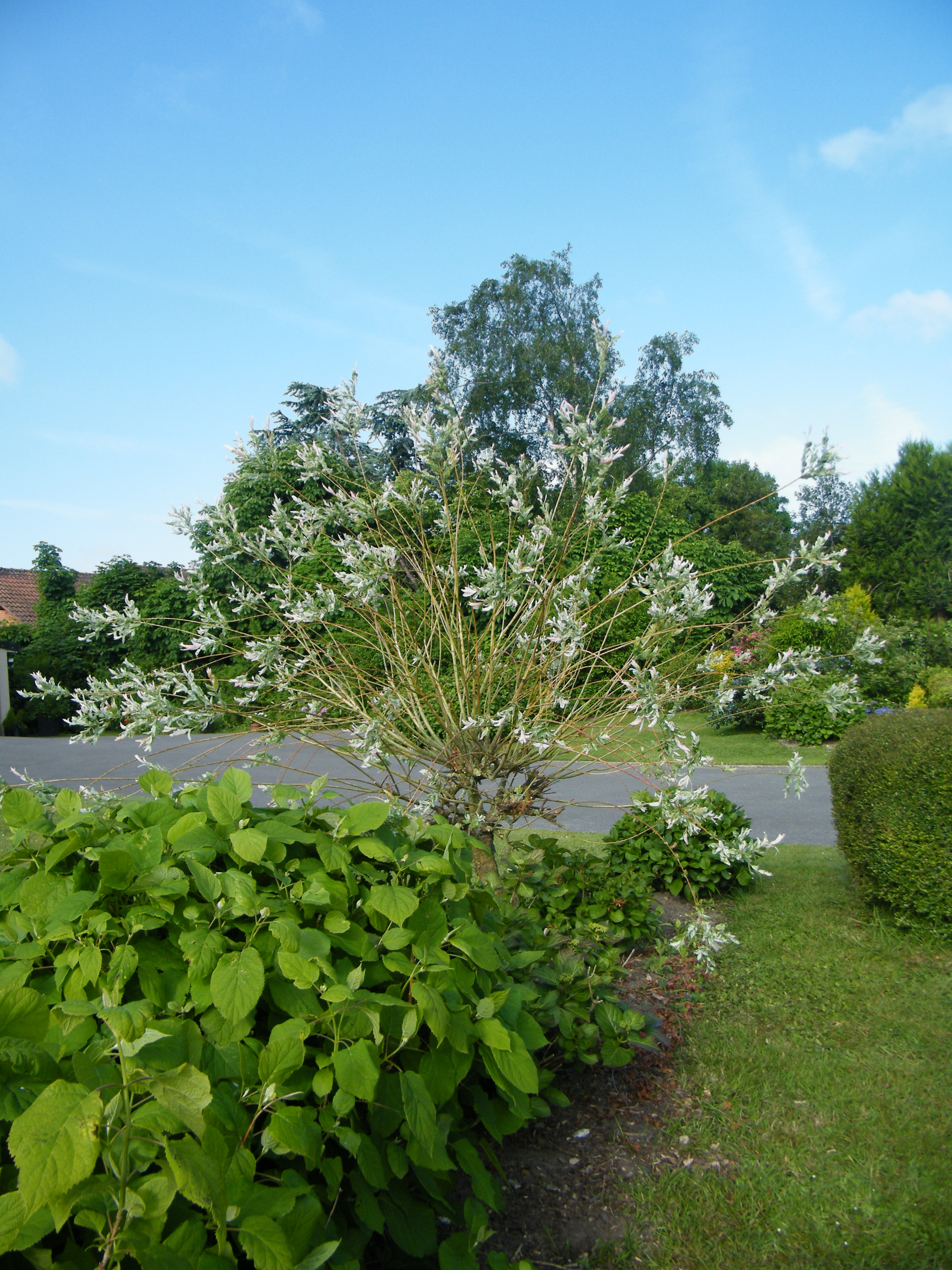 Salix integra, taille "aérienne" du saule crevette.